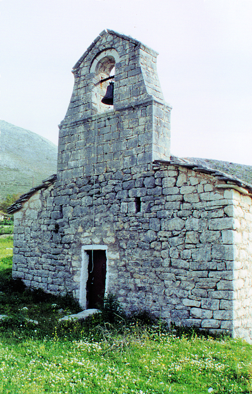 Ζωοδόχος Πηγή Αρχοντοχωρίου.